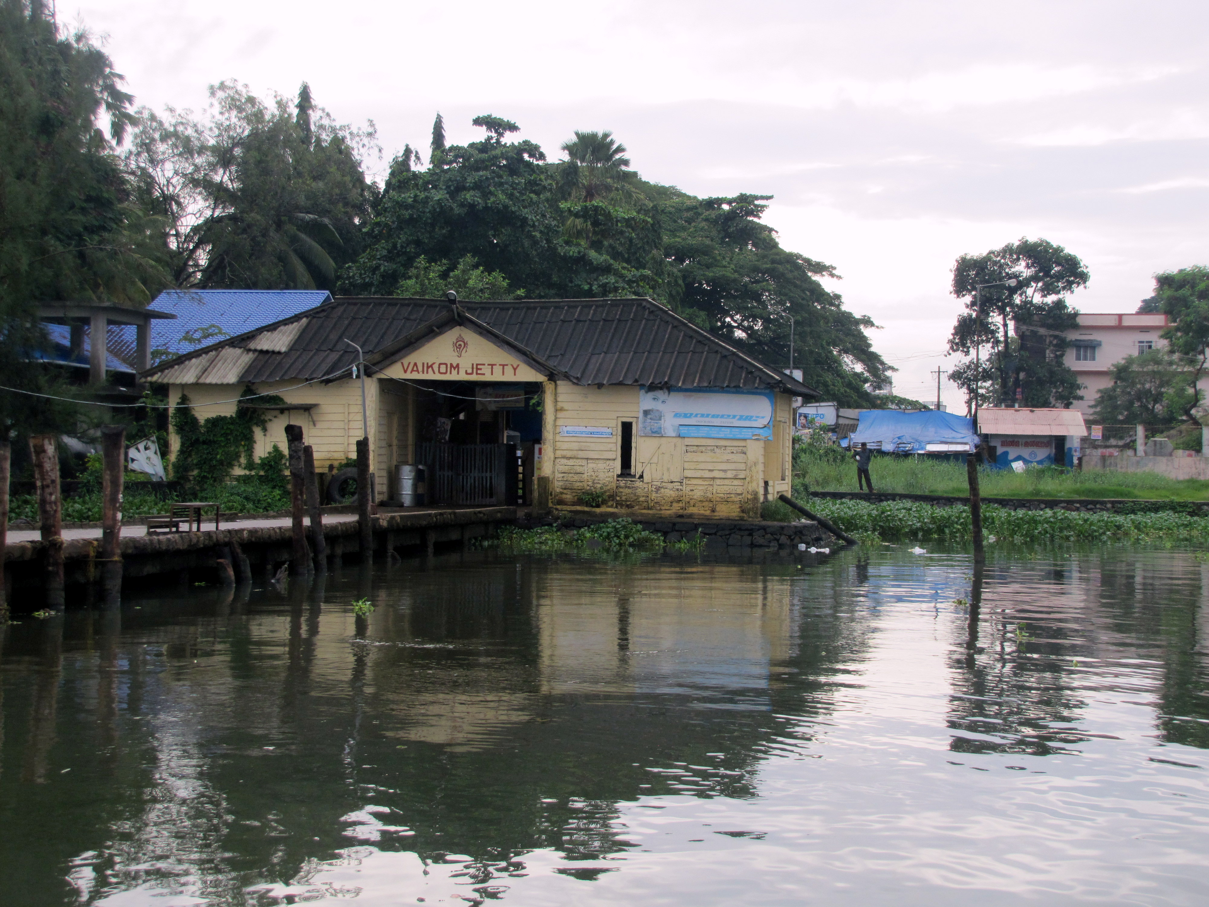 വൈക്കം ബോട്ട്ജെട്ടി